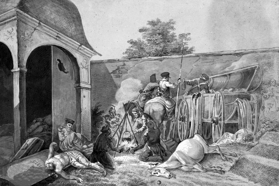 Lagerszene auf dem alten Johannisfriedhof nach der Schlacht von 1813; Kreidezeichnung. Nach der Natur gezeichnet von Ernst Wilhelm Strassberger im Oktober 1813